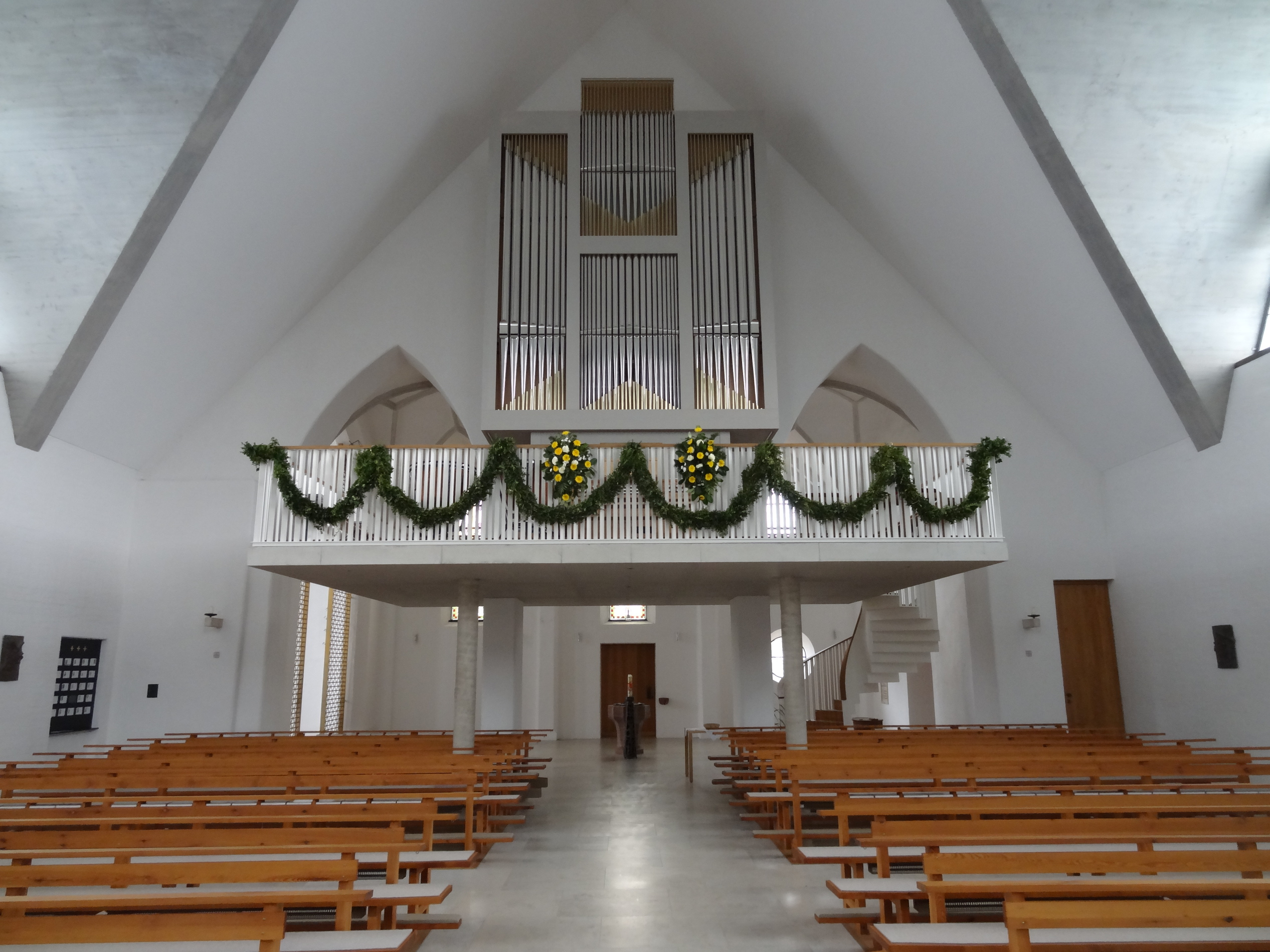 Orgelempore der kath. Pfarrkirche St. Johannes der Täufer in Bodenkirchen (Lkr. Landshut, Bayern)